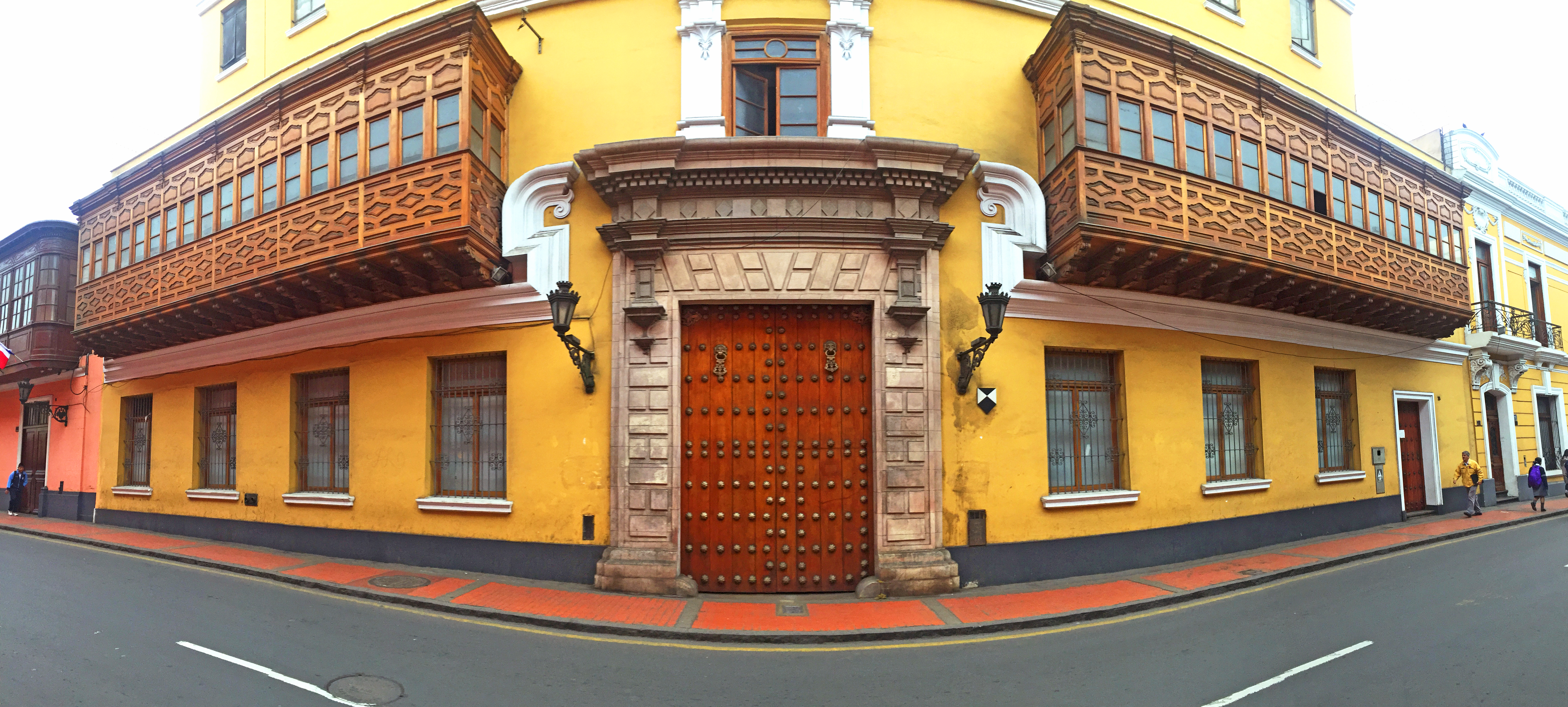 Casa de Nicolás de Rivera el viejo